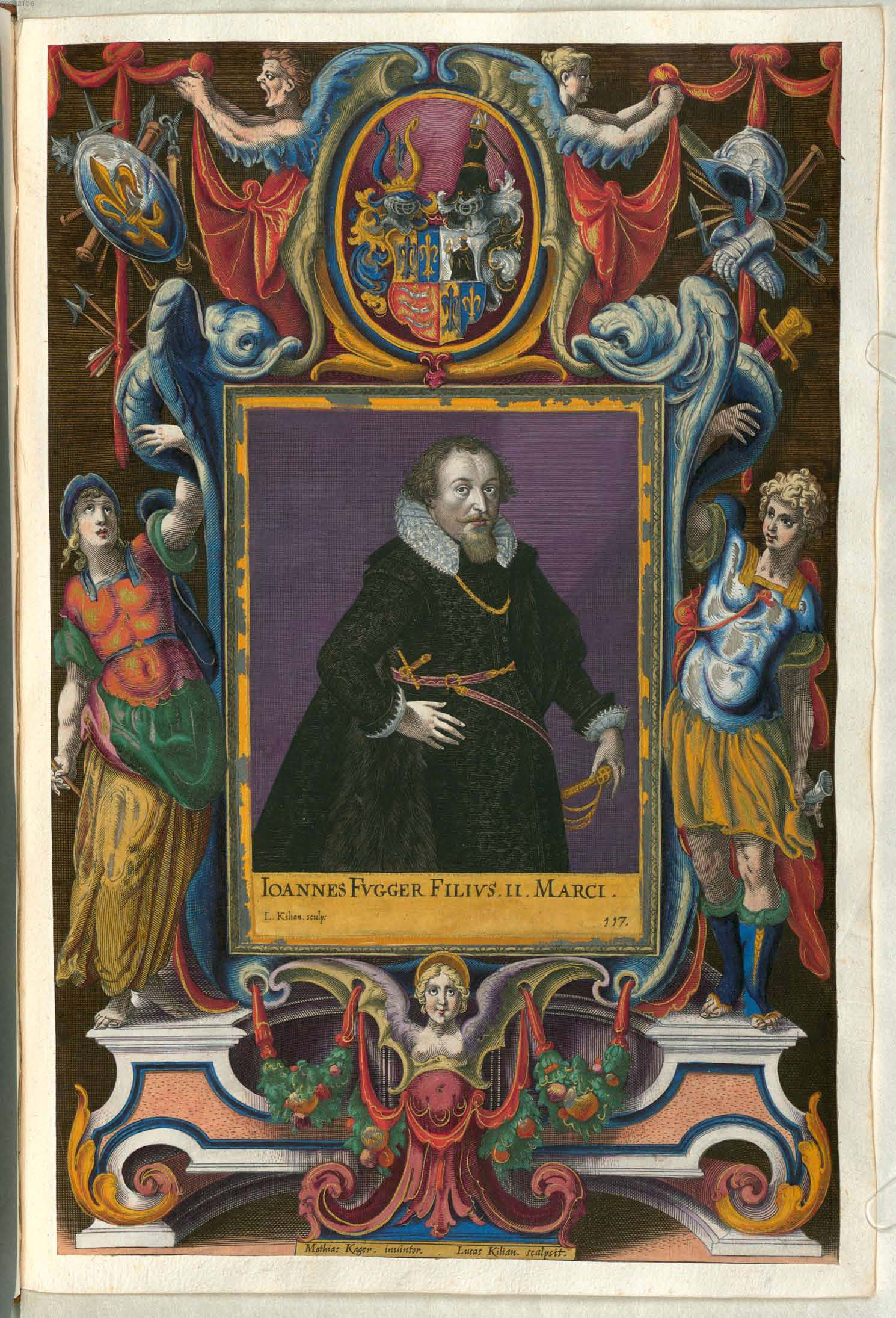 Fuggerorum et Fuggerarum imagines wurde 1588 von Philipp Eduard Fugger beim Kupferstecher Dominicus Custos in Auftrag gegeben. Das Werk enthält mit Aquarell- und Gouache-Farbe kolorierte Stiche der Mitglieder der Fugger von der Lilie. Der Druck von 1618 stellt das einzige kolorierte Exemplar dar.